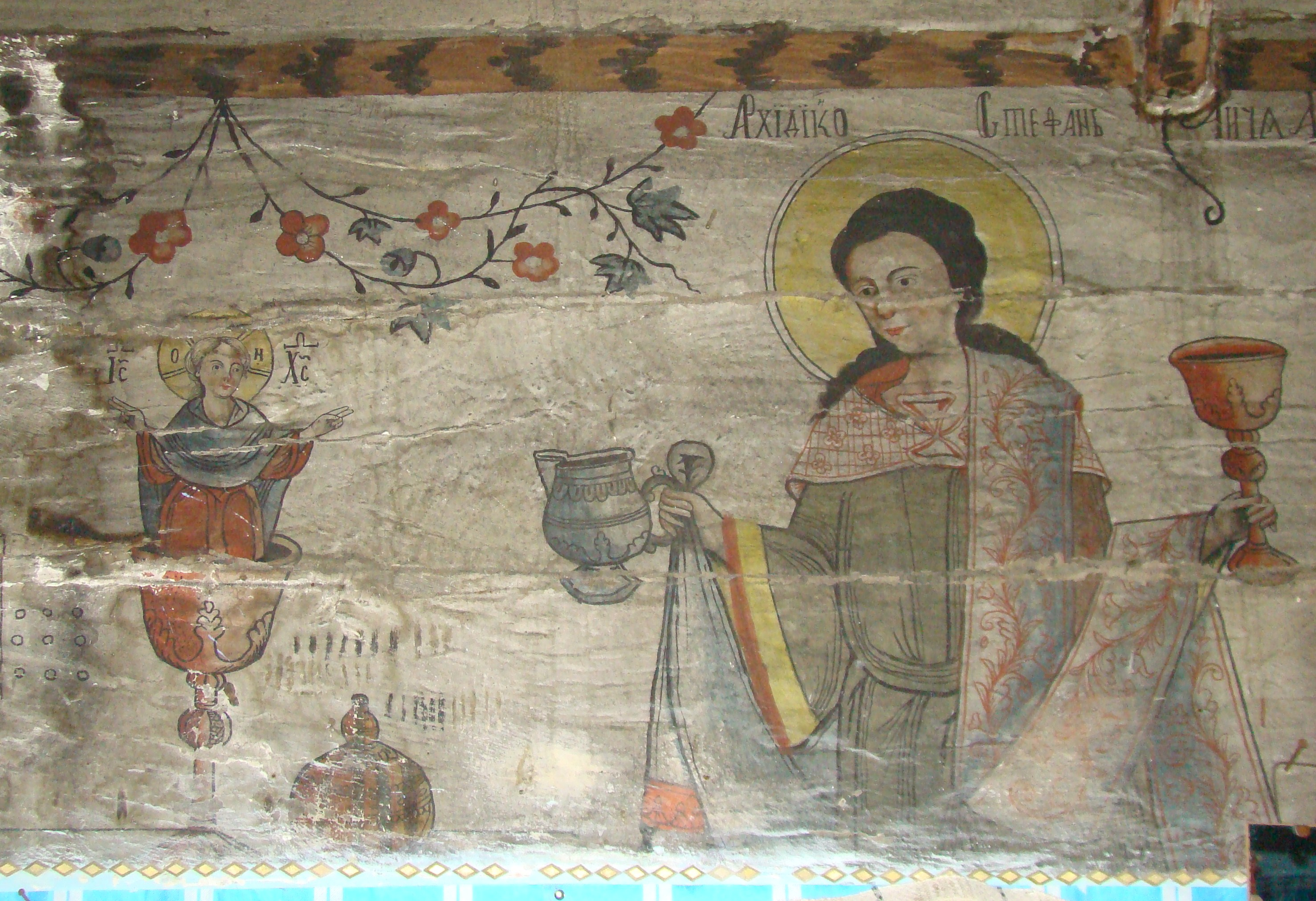 Biserica de lemn “Învierea Domnului” din Cubleșu, județul Sălaj